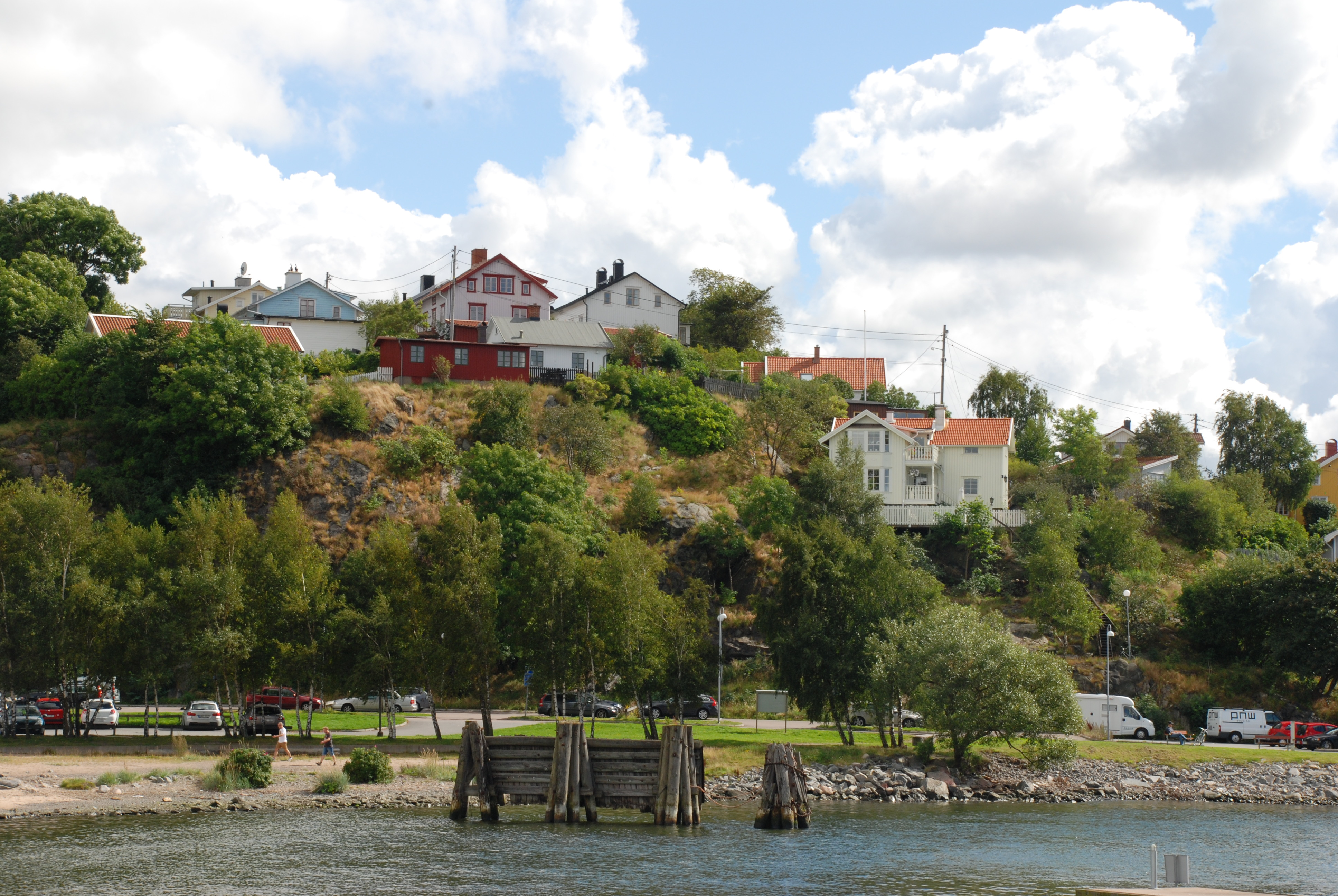 Slottsberget på Lindholmen i Göteborg sett från Sannegården.